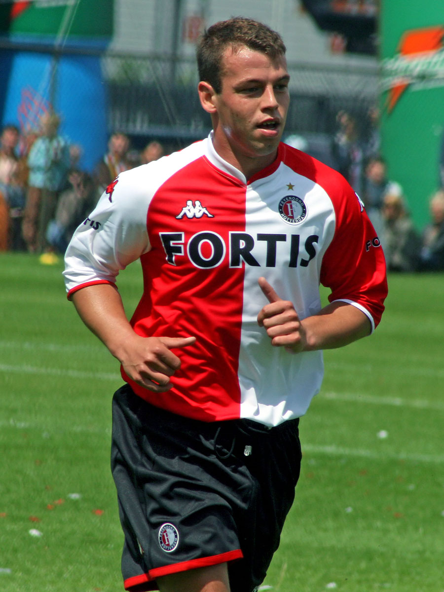 Nicky Hofs (Feyenoord)